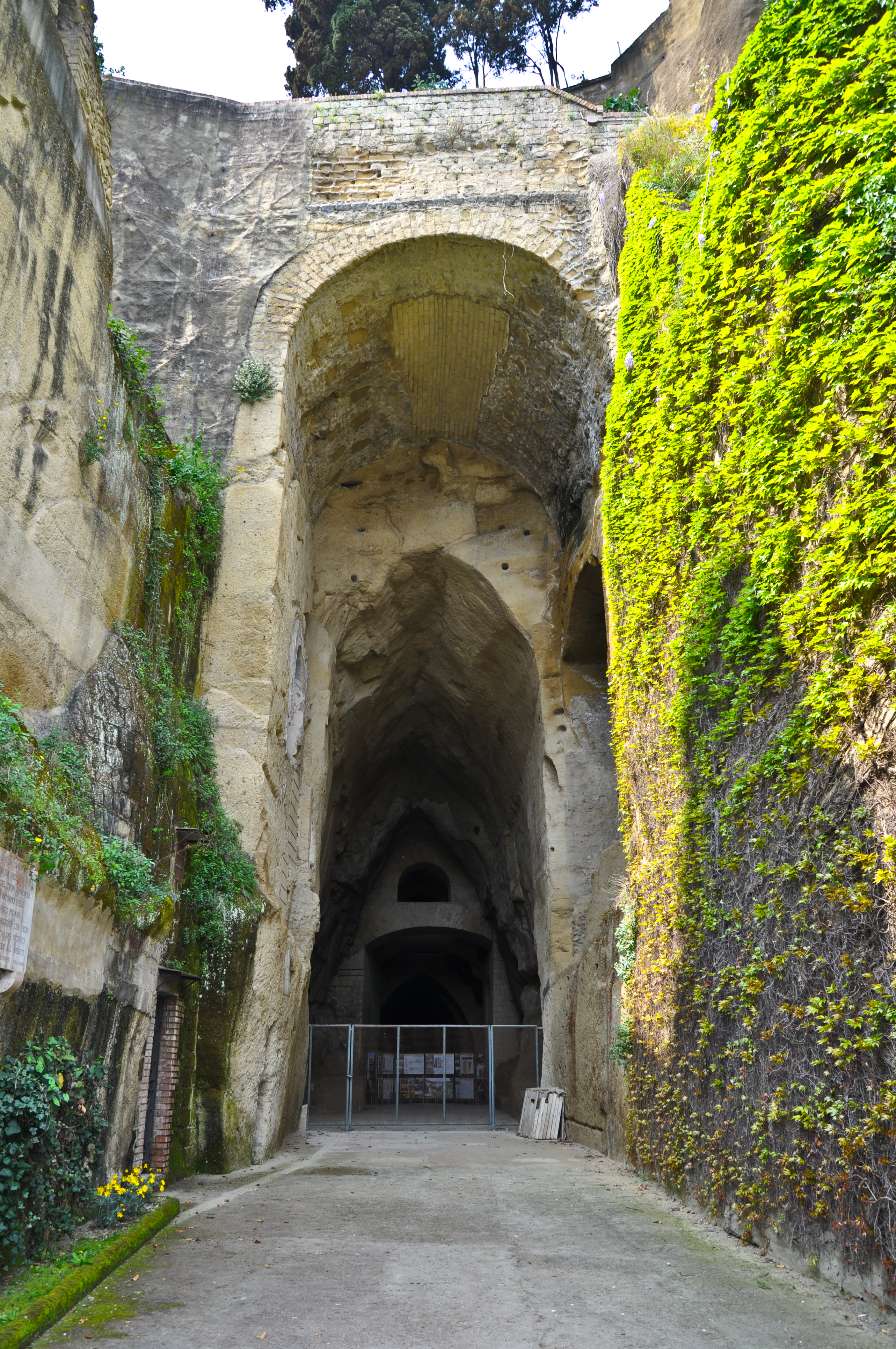 Crypta neapolitana (Parco Vergiliano, Napoli)